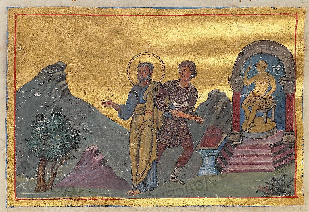 Der hl. Barlaam, Opfer der Diokletianischen Verfolgung, wird vor den Altar geschleppt, wo ihn sein Peiniger zwingen will, den Göttern zu opfern. Miniatur aus dem Menologion von Basilius II., Cod. Vat. Gr. 1613, Blatt 187, Vatikanische Apostolische Bibliothek.